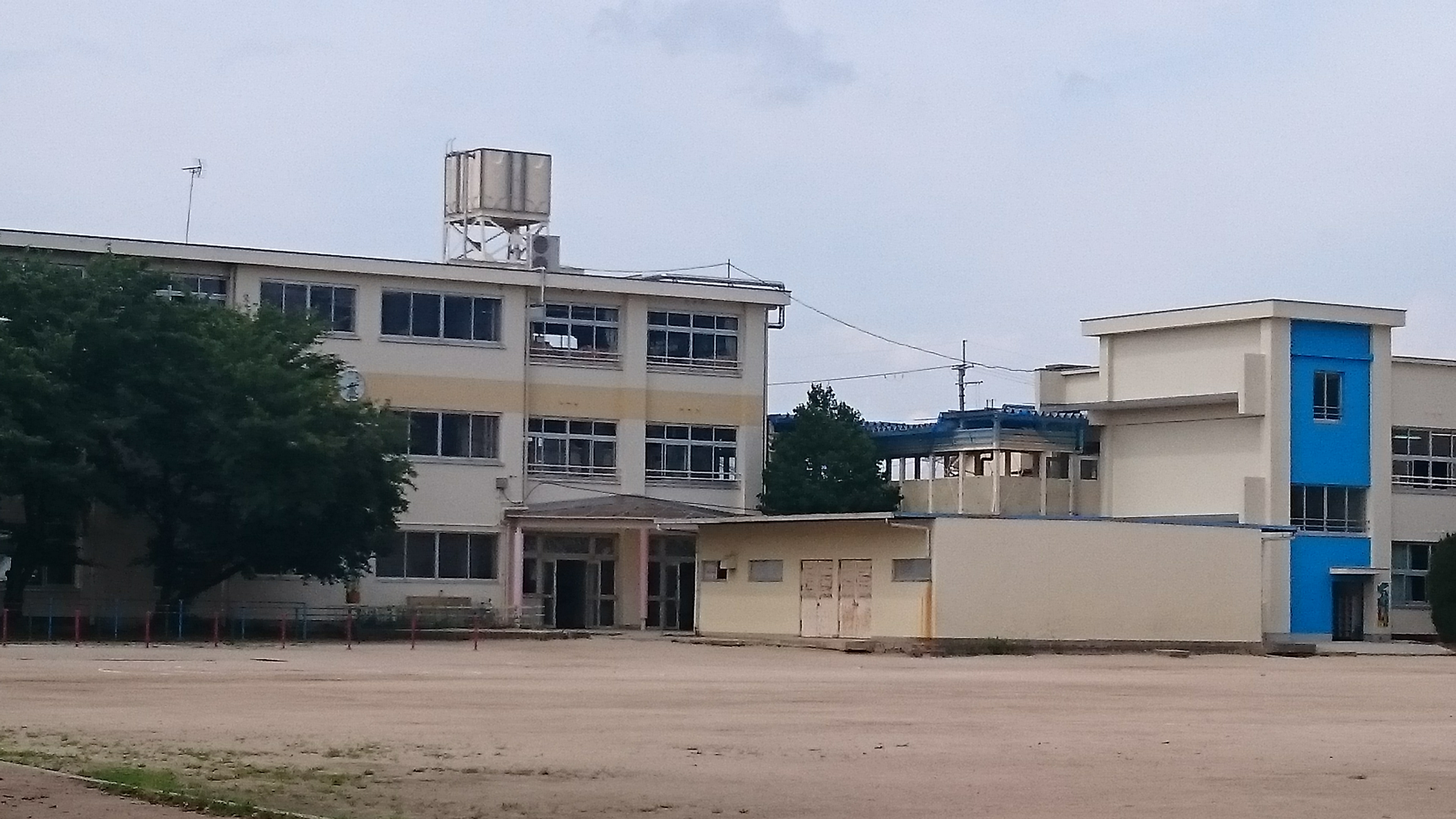 校庭より撮影